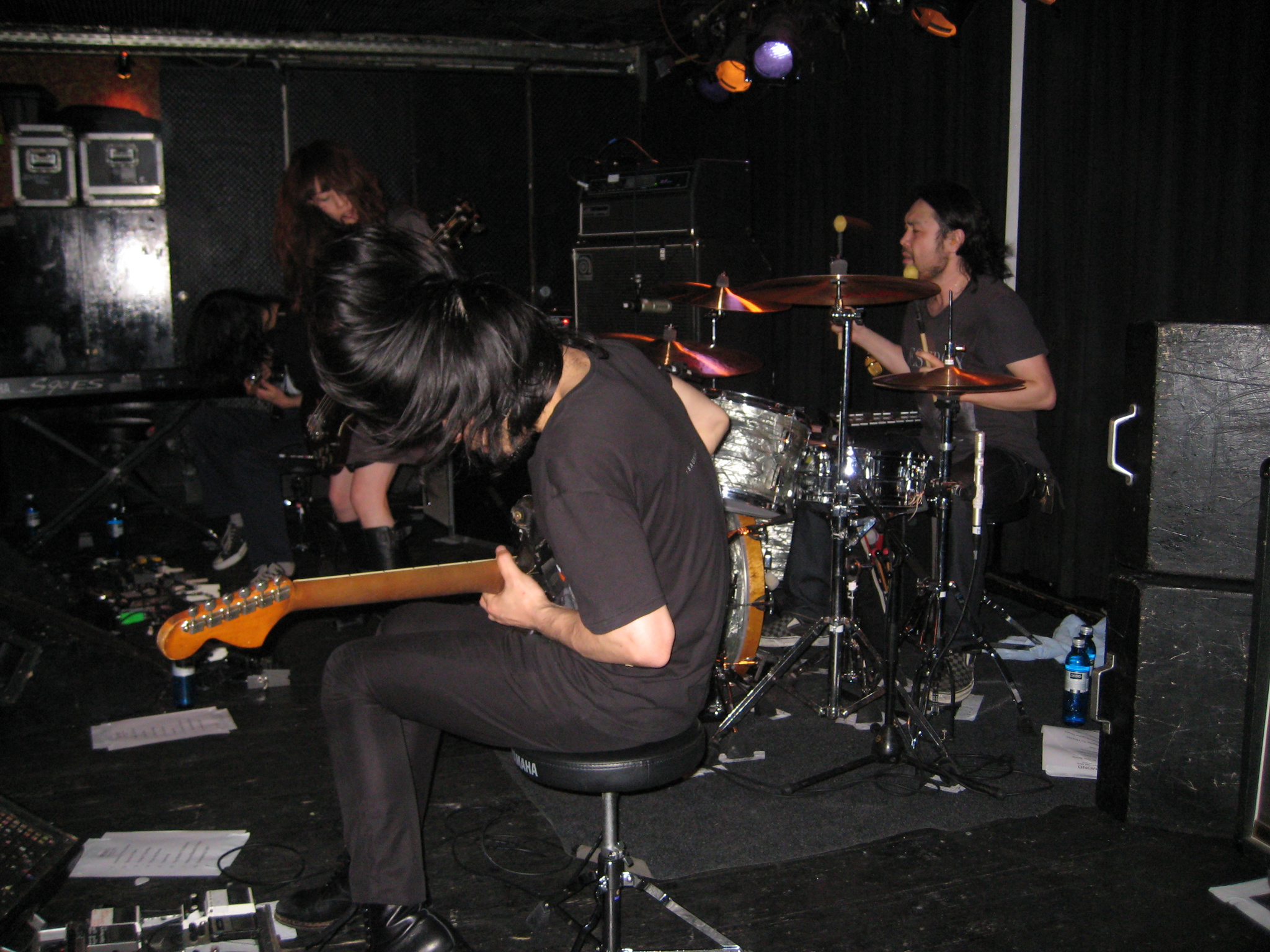 MONO live @ Nachtleben, Frankfurt/Main